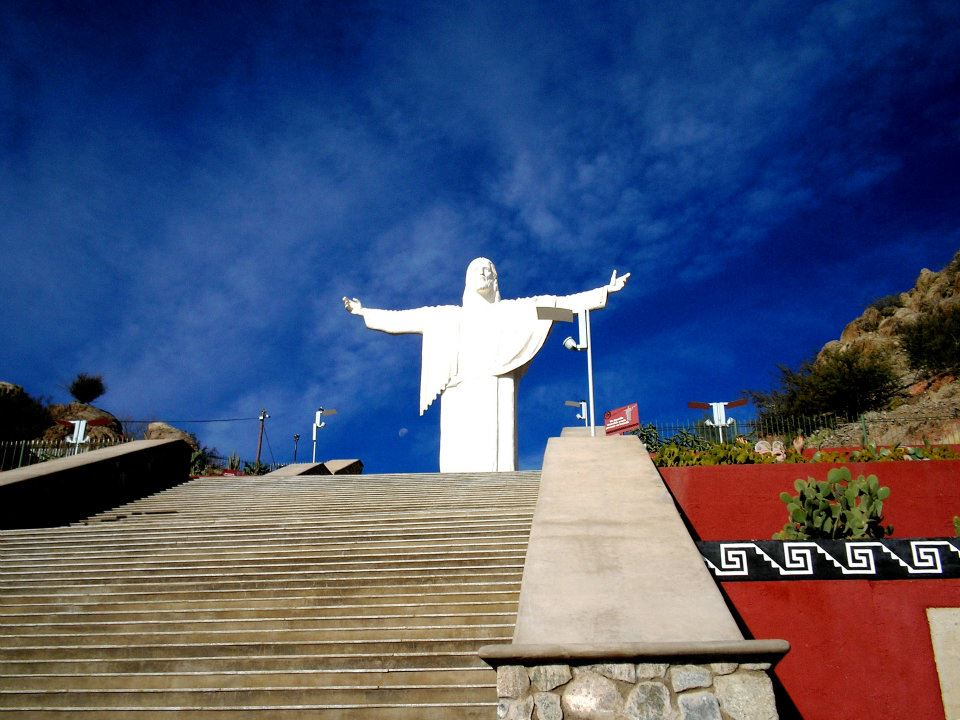 Chilecito - La Rioja (Argentina)